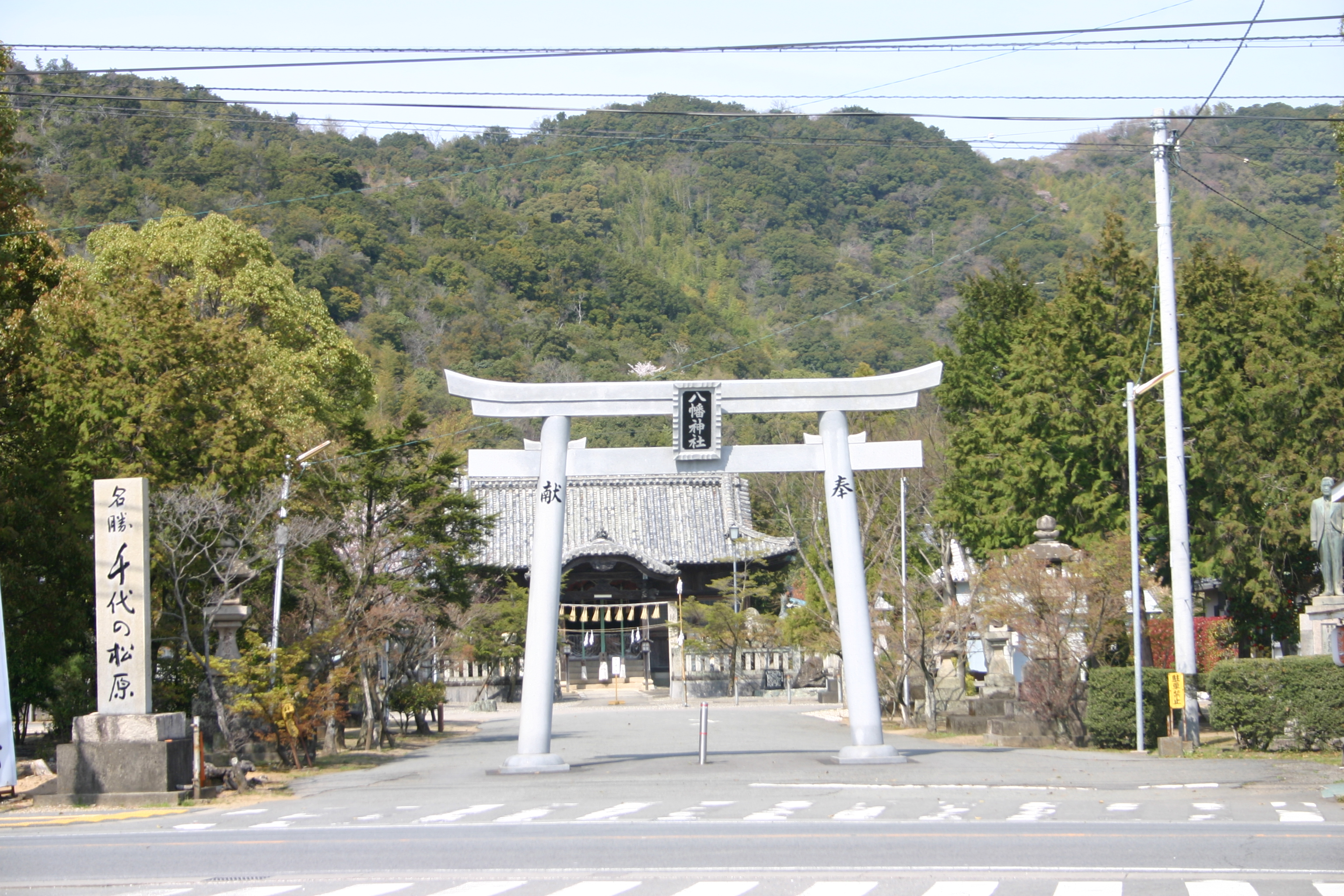 八幡神社と千代の松原